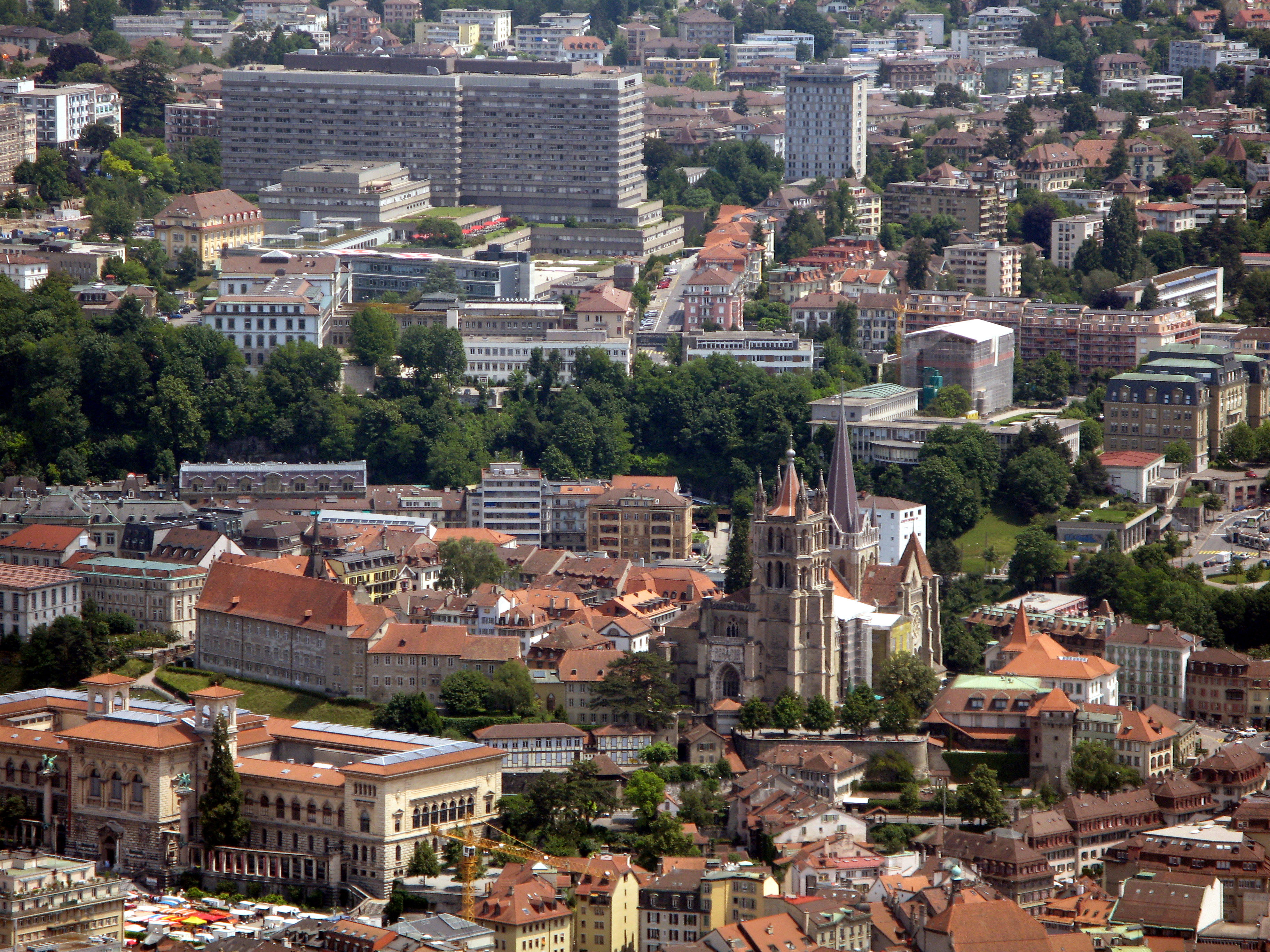 Lausanne